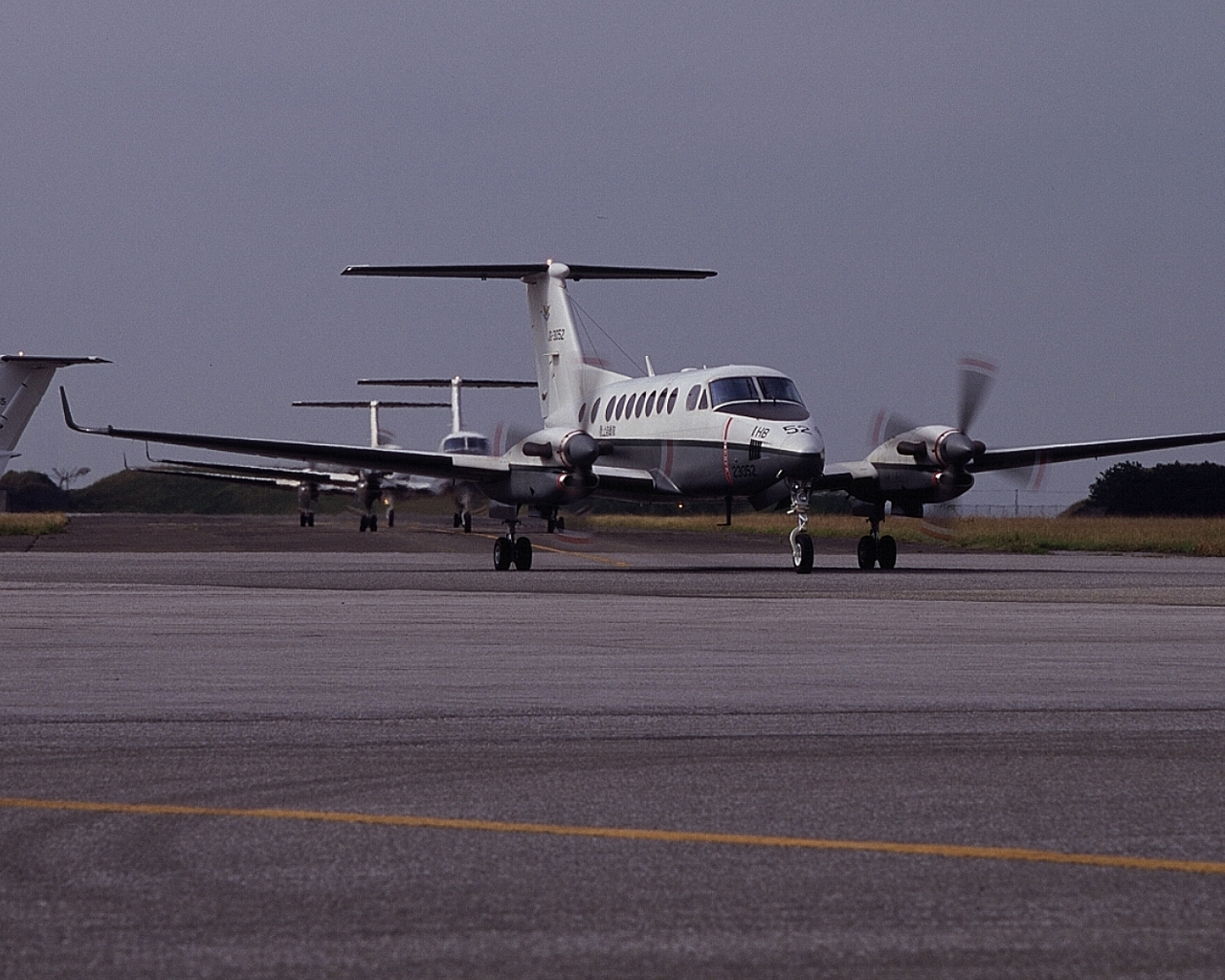 略称：LR-2 愛称：ハヤブサ [乗員]2（P）＋8人 ○機体 [全長]14.22m [全幅]17.65m [全高]4.37m [製作] （現）米国ビーチクラフト社 ○エンジン [名称]PT6A-60A [出力]1,050SHP×2 [製作] 加国プラット・アンド・ホイットニー社 [巡航速度]約440km/h [航続距離]約2,800km [実用上昇限度]約10,700m 連絡偵察機LR-1の後継。平成10年度2機を取得。米国ビーチクラフト社製キングエア350型に偵察用カメラ、患者空輸用ストレッチャーなどを搭載した陸自仕様に改修、平成11年1月22日に初号機が納入され、性能確認試験、操縦教育等が実施され、北部及び西部方面航空隊、ヘリコプター団等に配備されている。